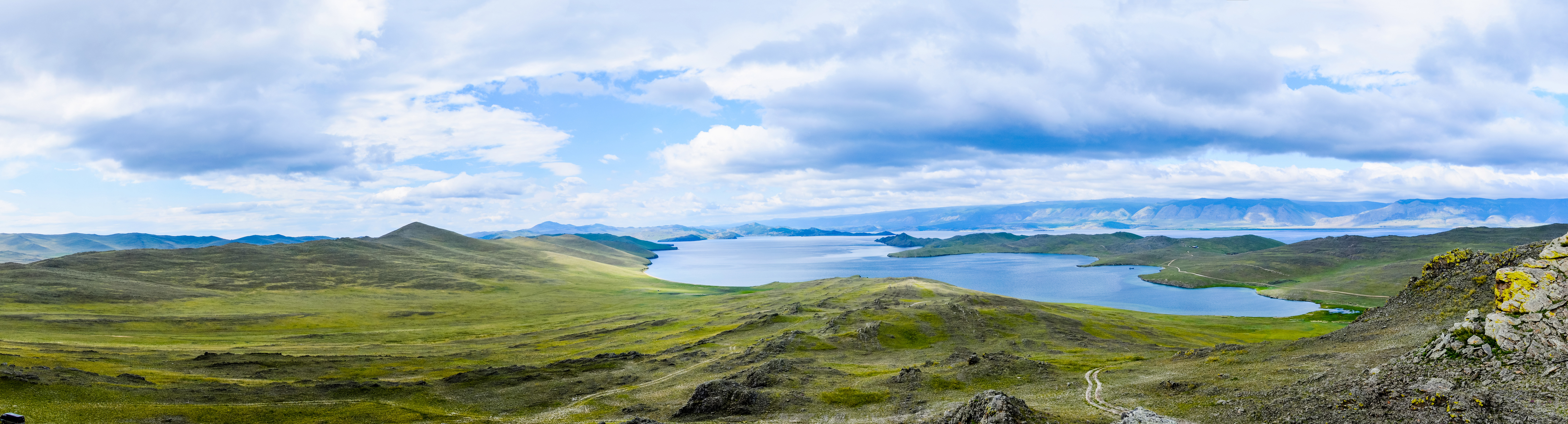 Мыс Кобылья Голова: Прибайкальский национальный парк, юго-западная оконечность о. Ольхон. Мыс Кобылья Голова (по-бурятски Харин Ирги) расположен на юго-западной оконечности острова Ольхон, замыкает со стороны острова северную часть пролива Ольхонские ворота. Координаты N 53 03 742 E 106 54 168, Ольхонский район, Иркутская область This image is related to the protected area of Russia number 3810275